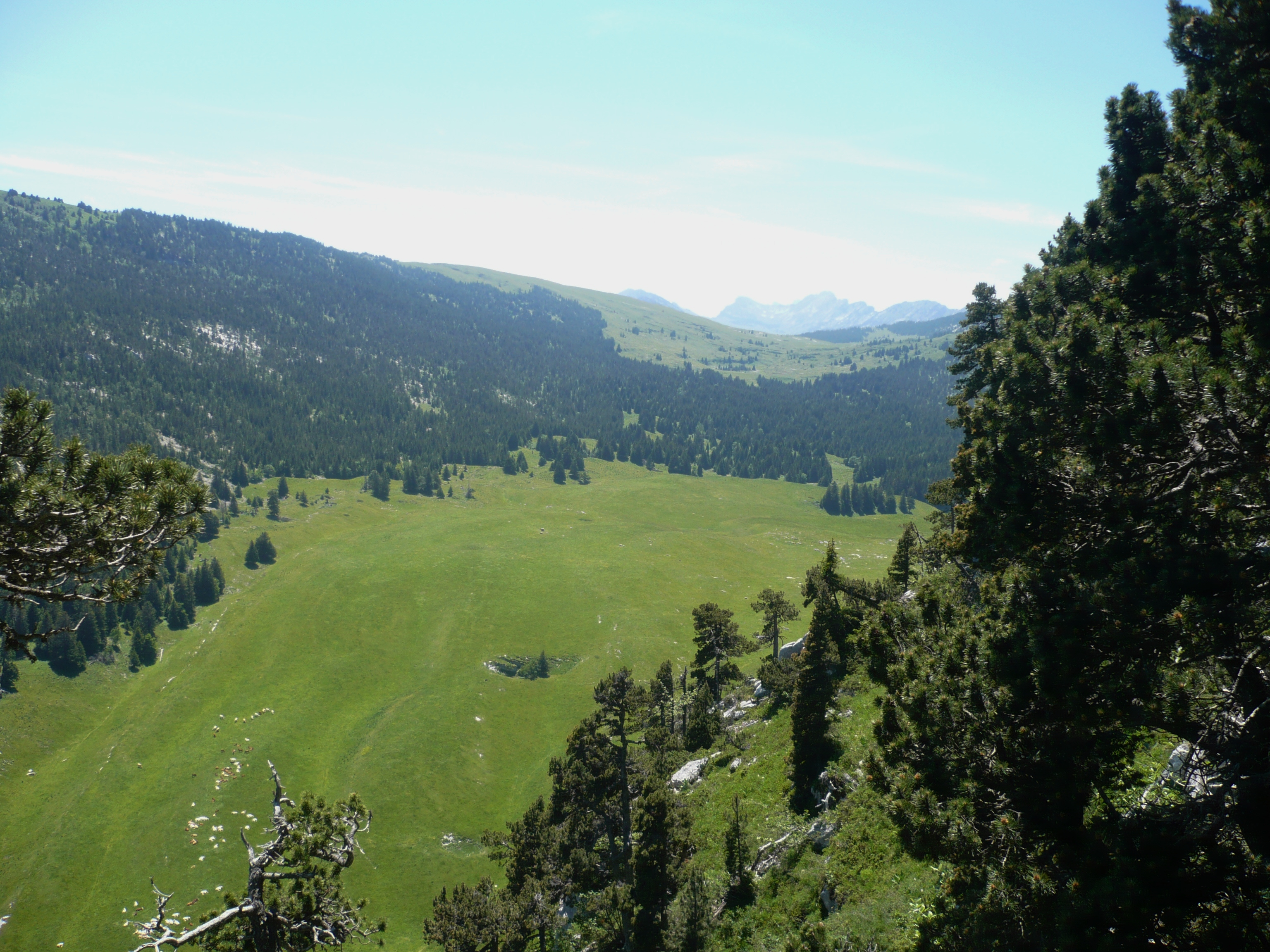 Vue depuis le pas des barres du synclinal ou se situe le réseau de l'Alpe.